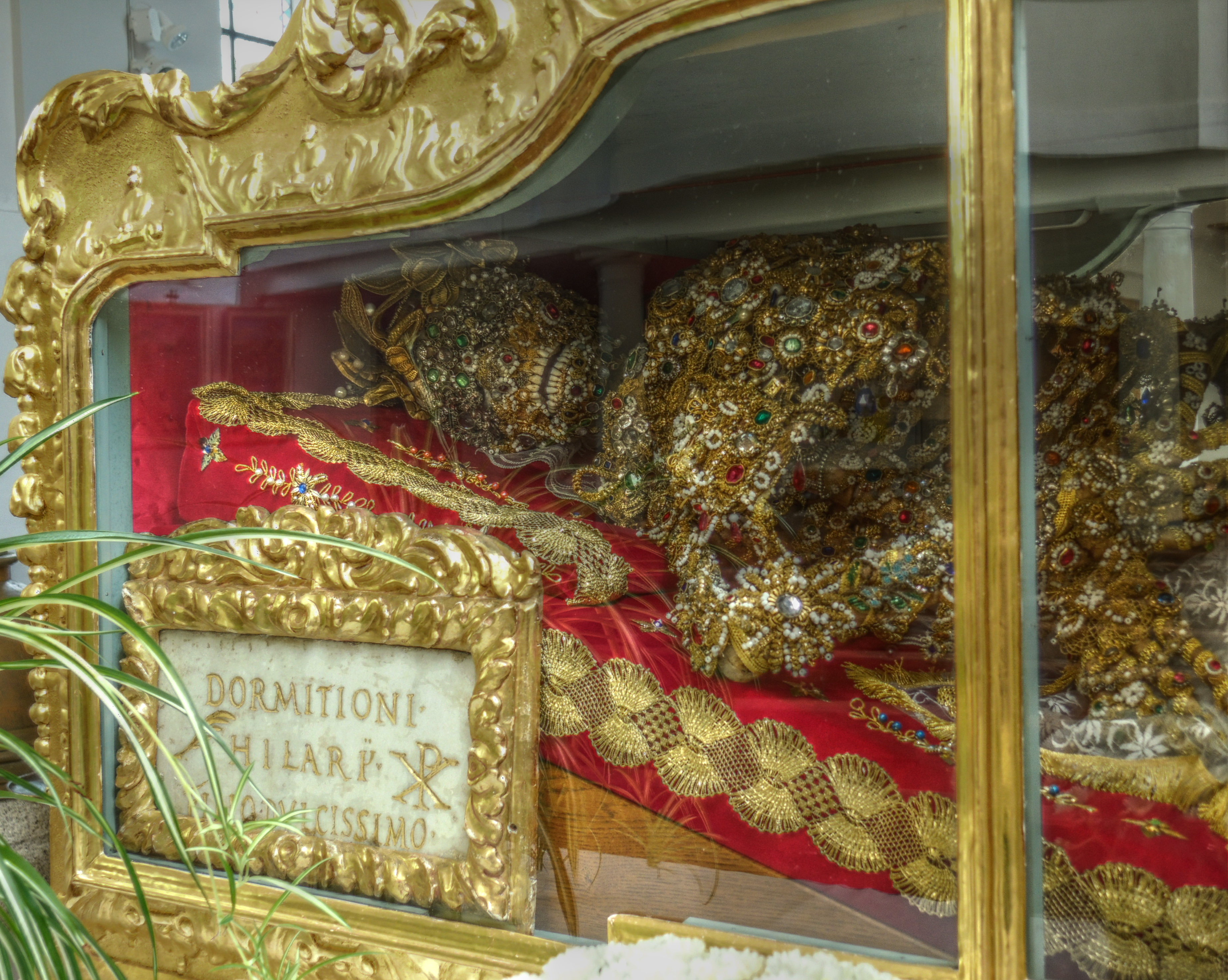 Reliquienschrein des Hl. Hilarius (Katakombenheiliger) in der Pfarrkirche St. Jakobus in Achslach